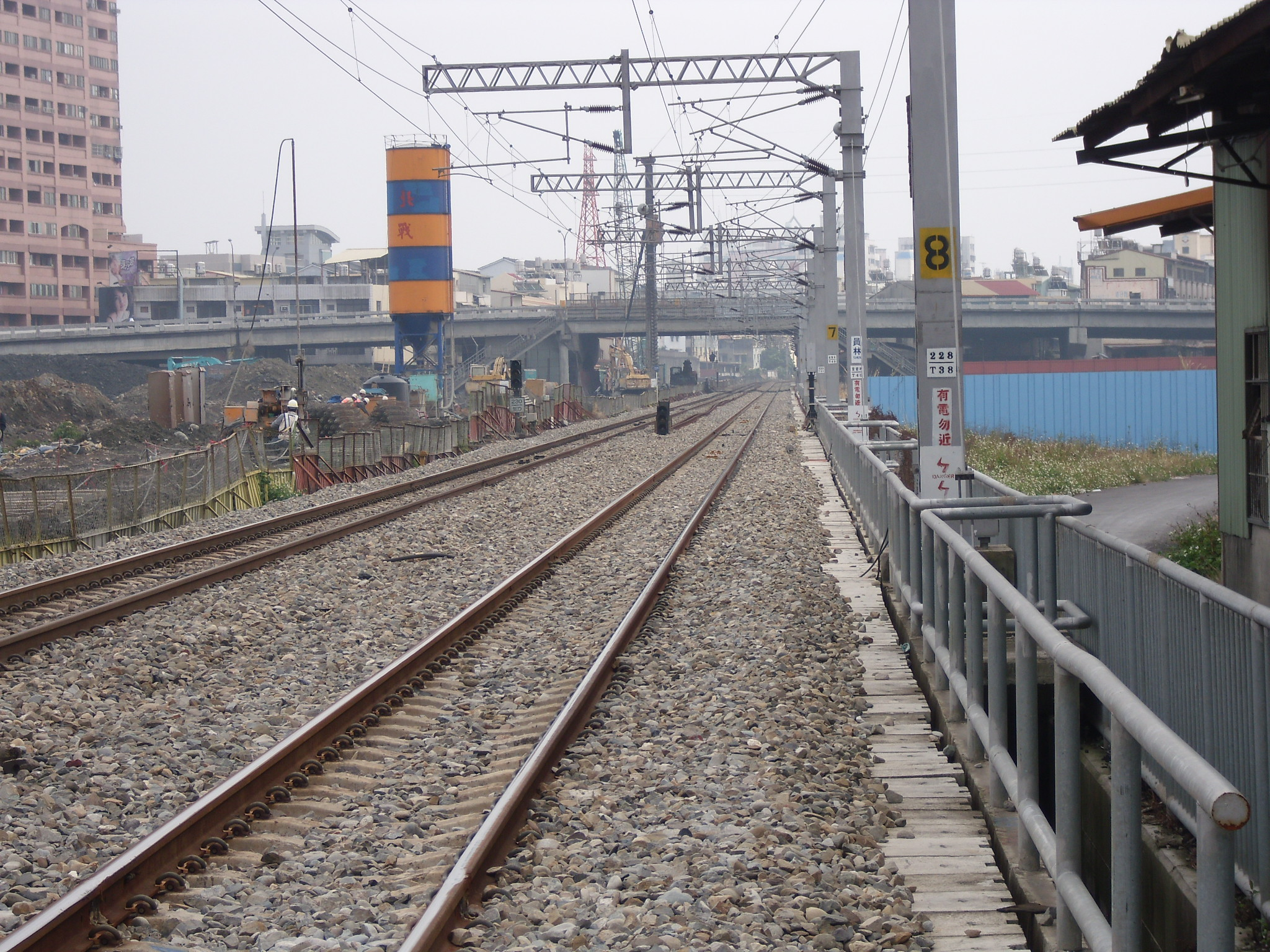 Bân-lâm-gú: 對北勢仔翕鐵枝路佮天橋（莒光路橋），鐵枝路兩爿攏有工程咧做，彼是咧做員林鐵路高架計劃佮員林都市計畫，到尾仔天橋就會予儂拆掉 。